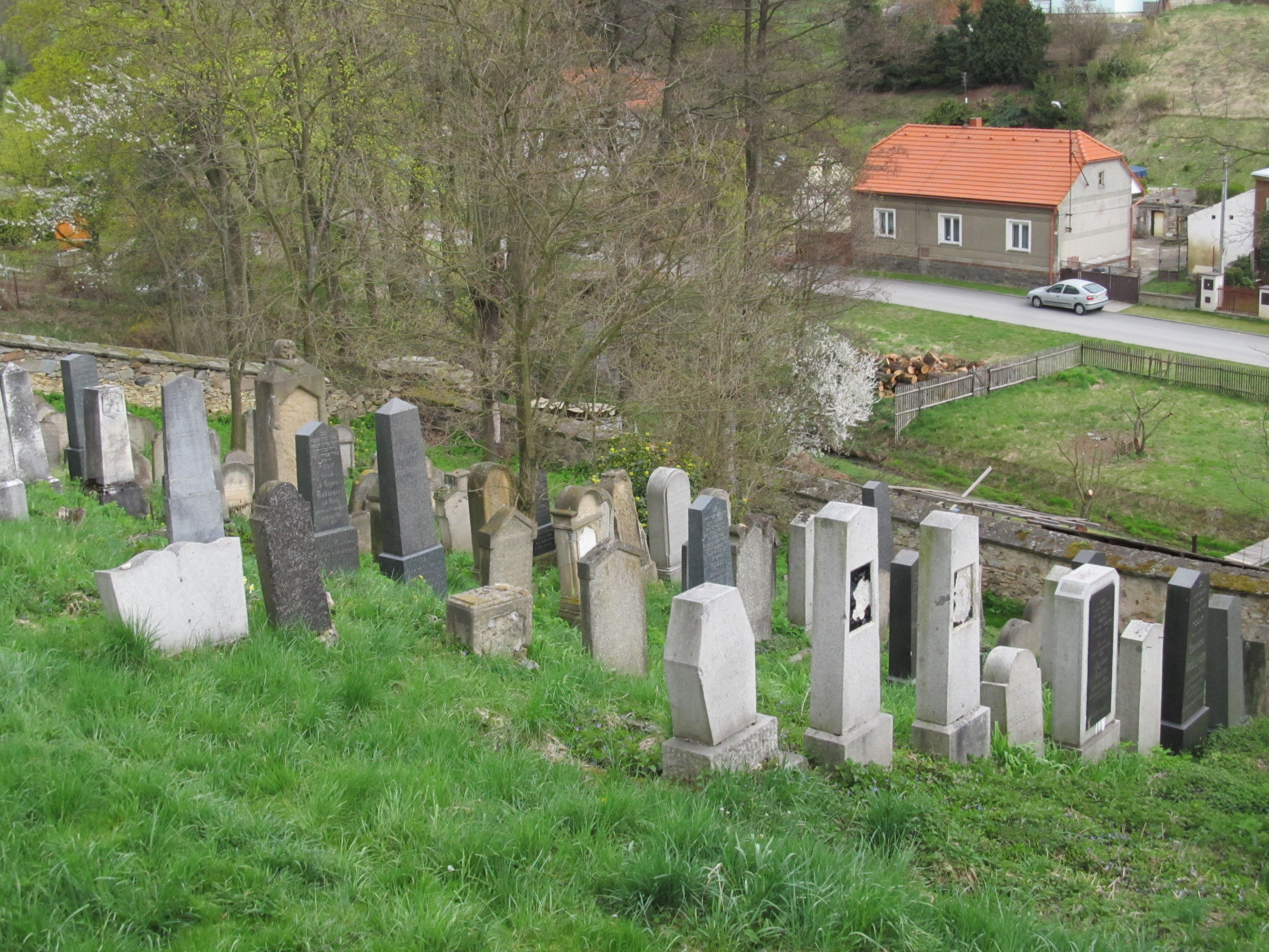 Štěnovice 02 ŽH